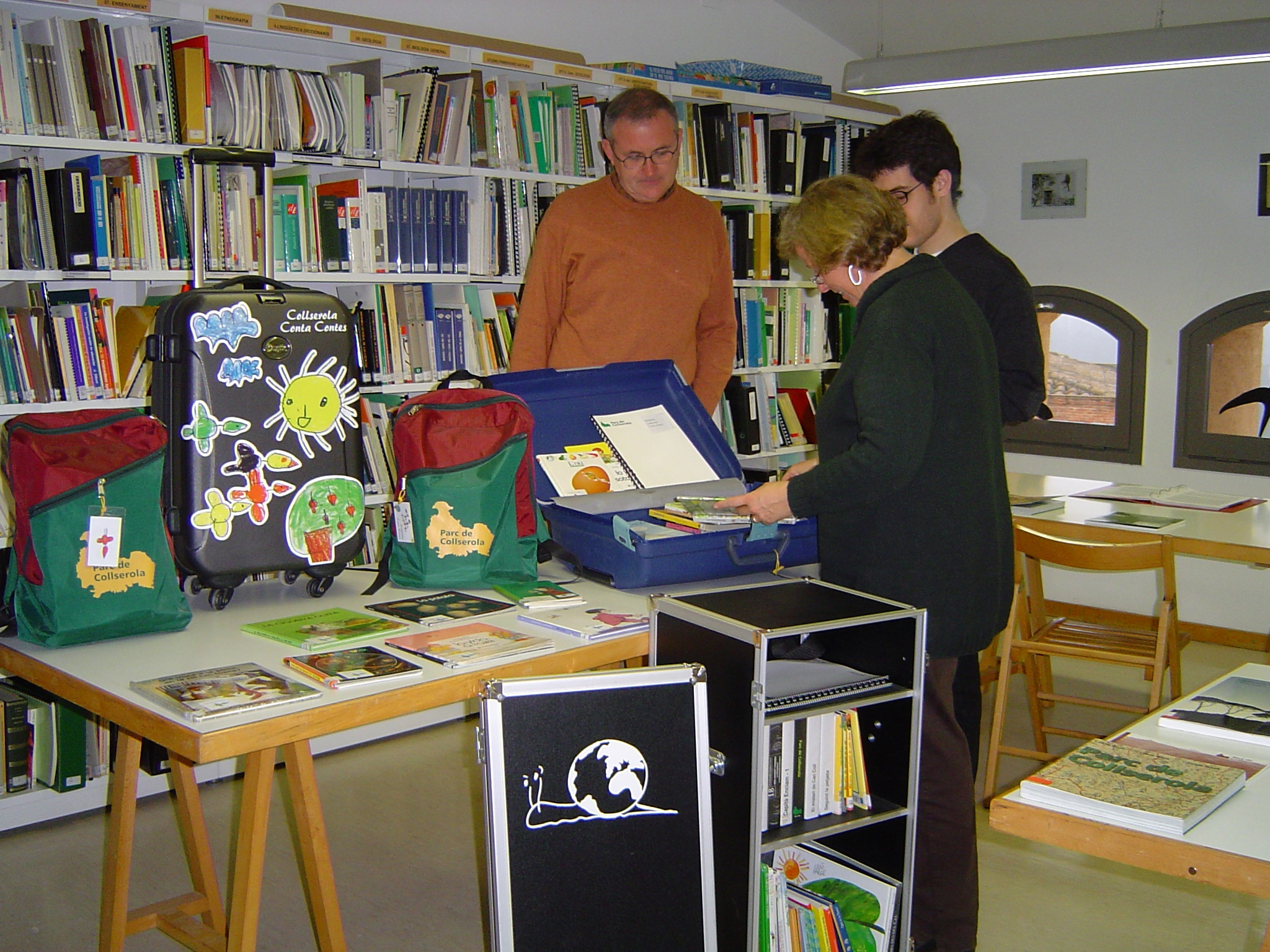 El Centre de Documentació i Recursos Educatius funciona des del 1993. Està ubicat al centre d'educació ambiental de Can Coll i ofereix un servei d'informació i documentació per aprofundir en el coneixement i la recerca de Collserola i de l'educació ambiental en general. El seu fons compta amb uns 6500 documents, amb servei de préstec i/o consulta.